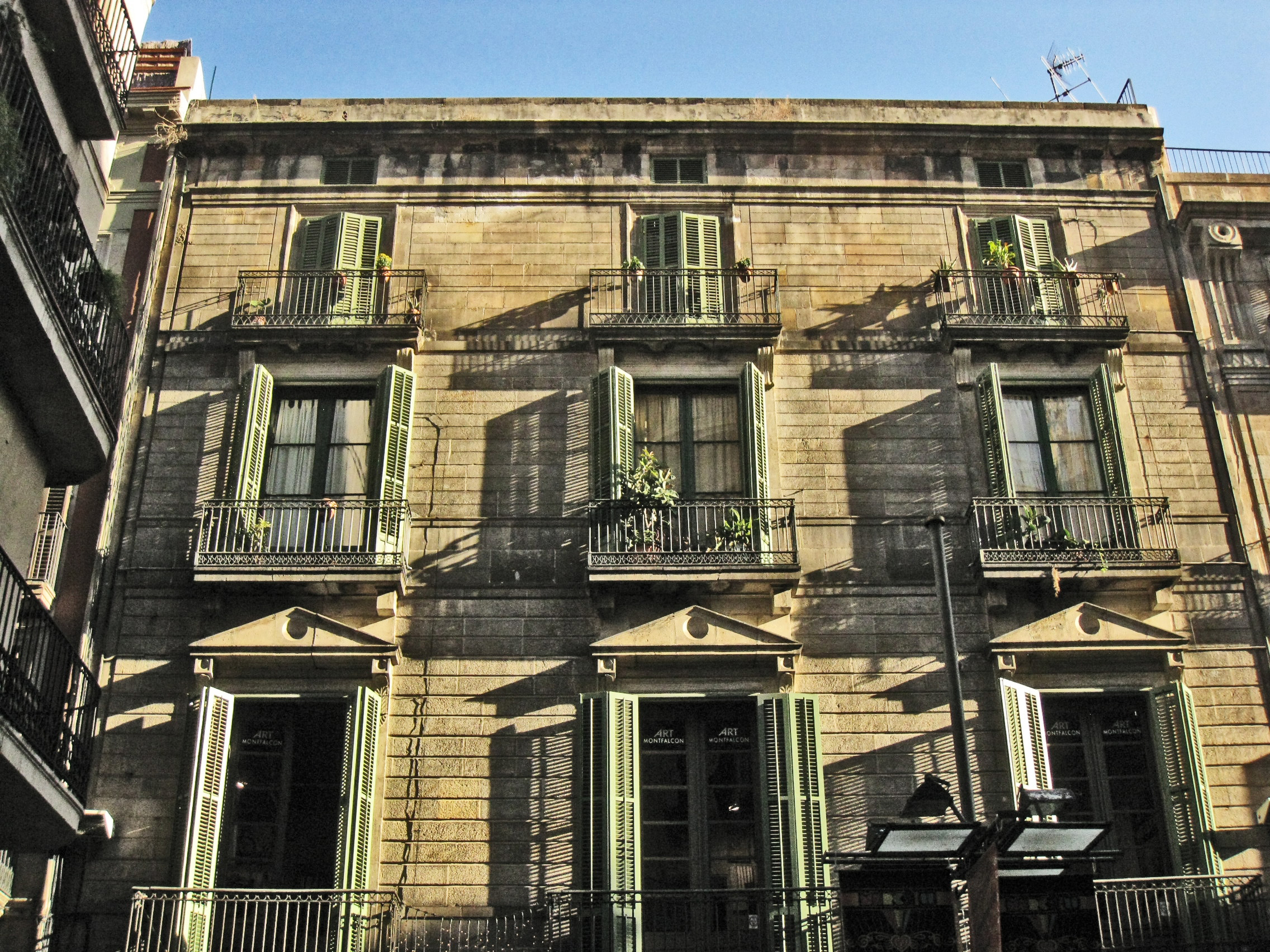 Palau Castanyer, del segle XIX, al carrer Boters núm. 2, al barri Gòtic de Barcelona